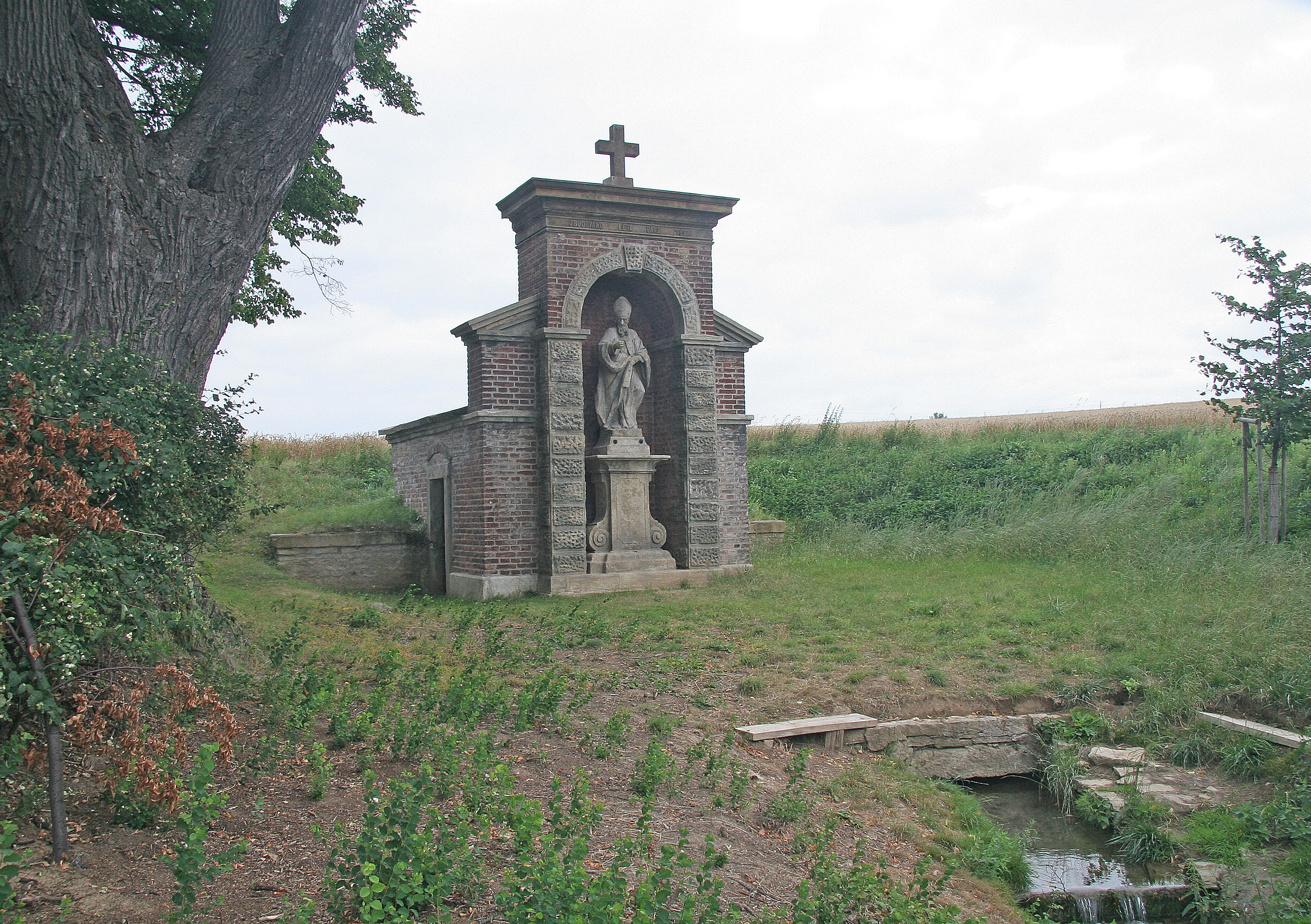 Kaple sv. Vojtěcha (Bylany), Z od silnice Bylany - Přítoky, Bylany